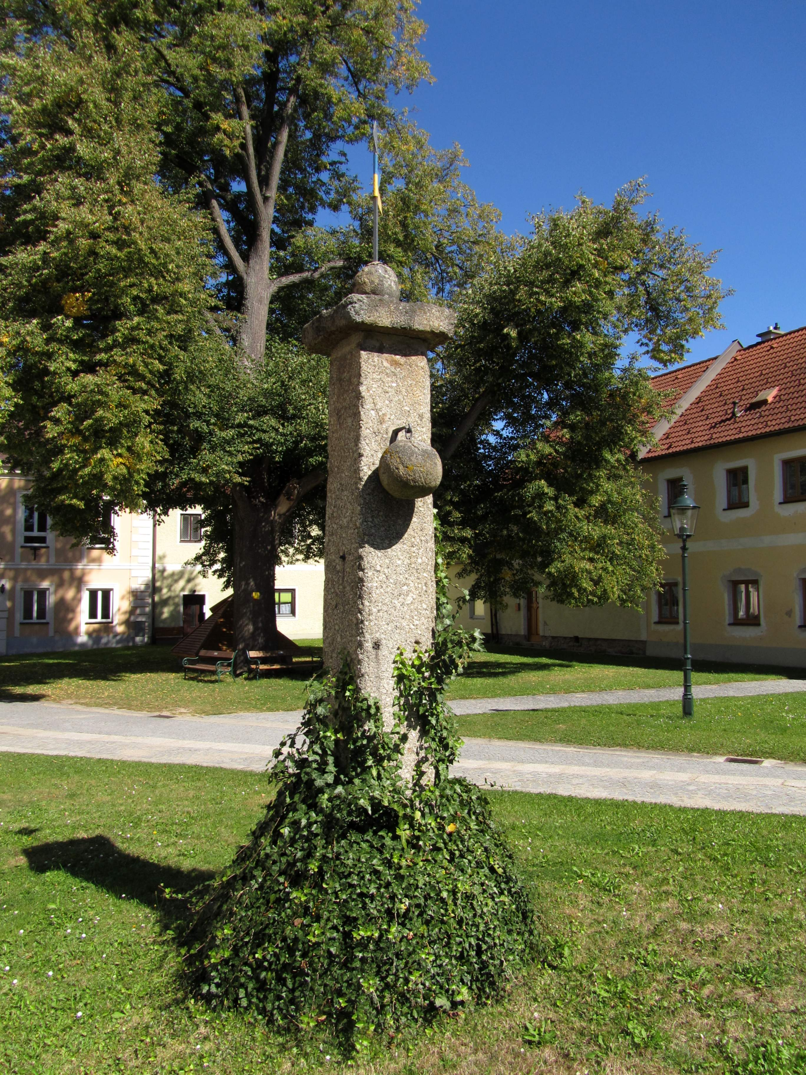 Pranger This media shows the natural monument in Lower Austria with the ID GD-059.